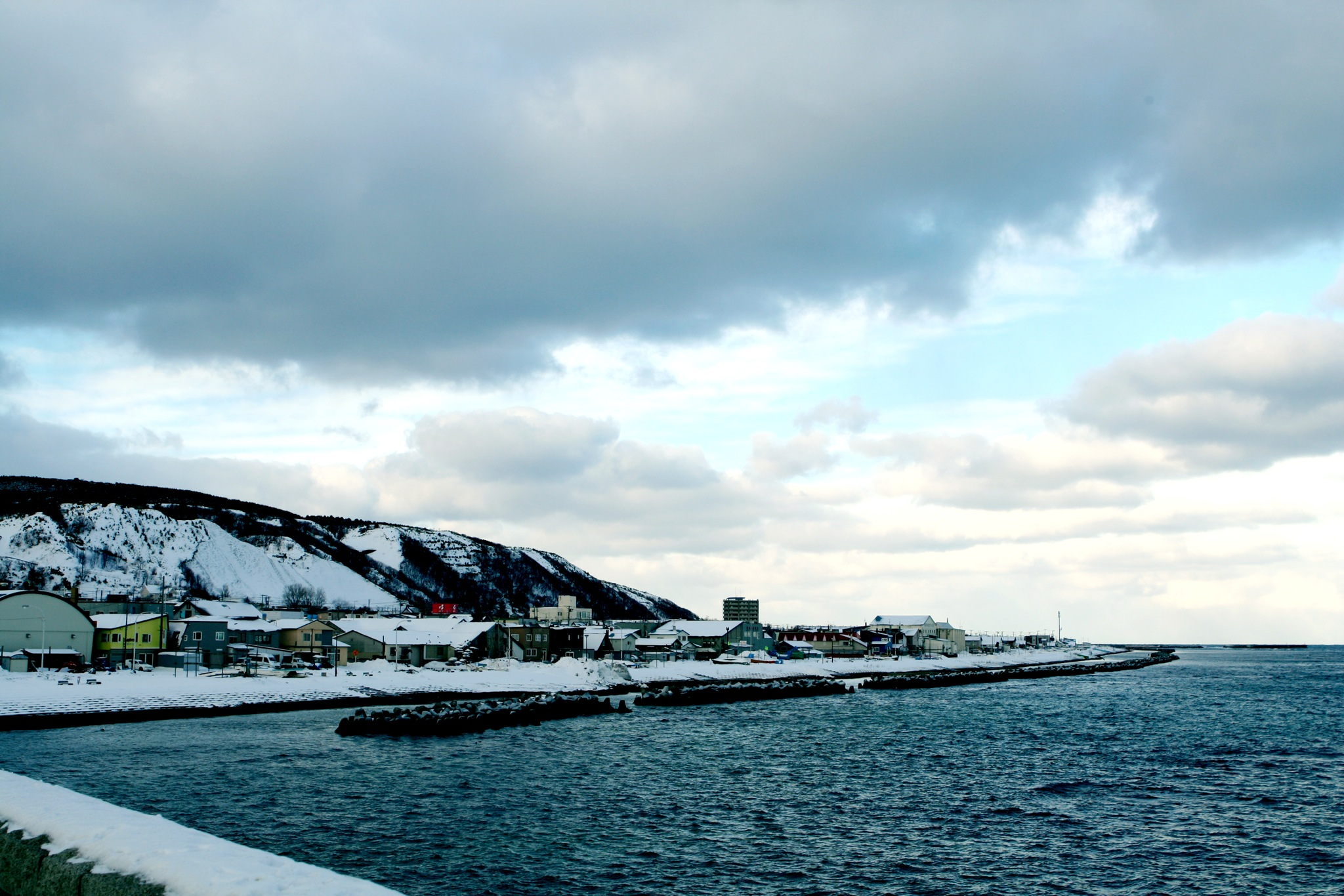 Shore of Wakkanai, Hokkaido.